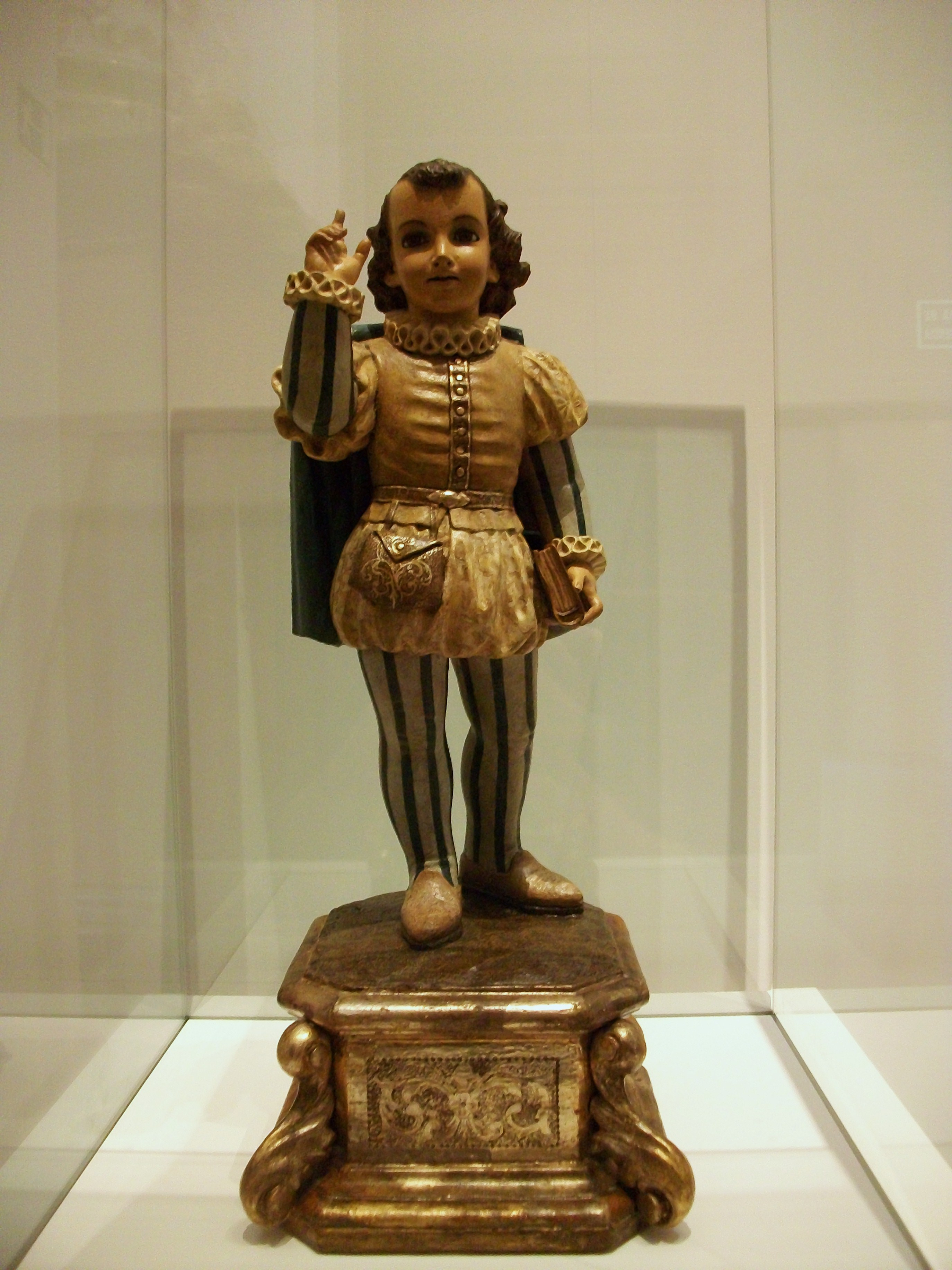 Imatge de Sant Vicent Ferrer xiquet, de Josep Esteve i Bonet (1741-1801). Fusta policromada i estofada 61 x 21 x 21 cm. Últim terç del segle XVIII, procedent de l'església de Sant Esteve de València.